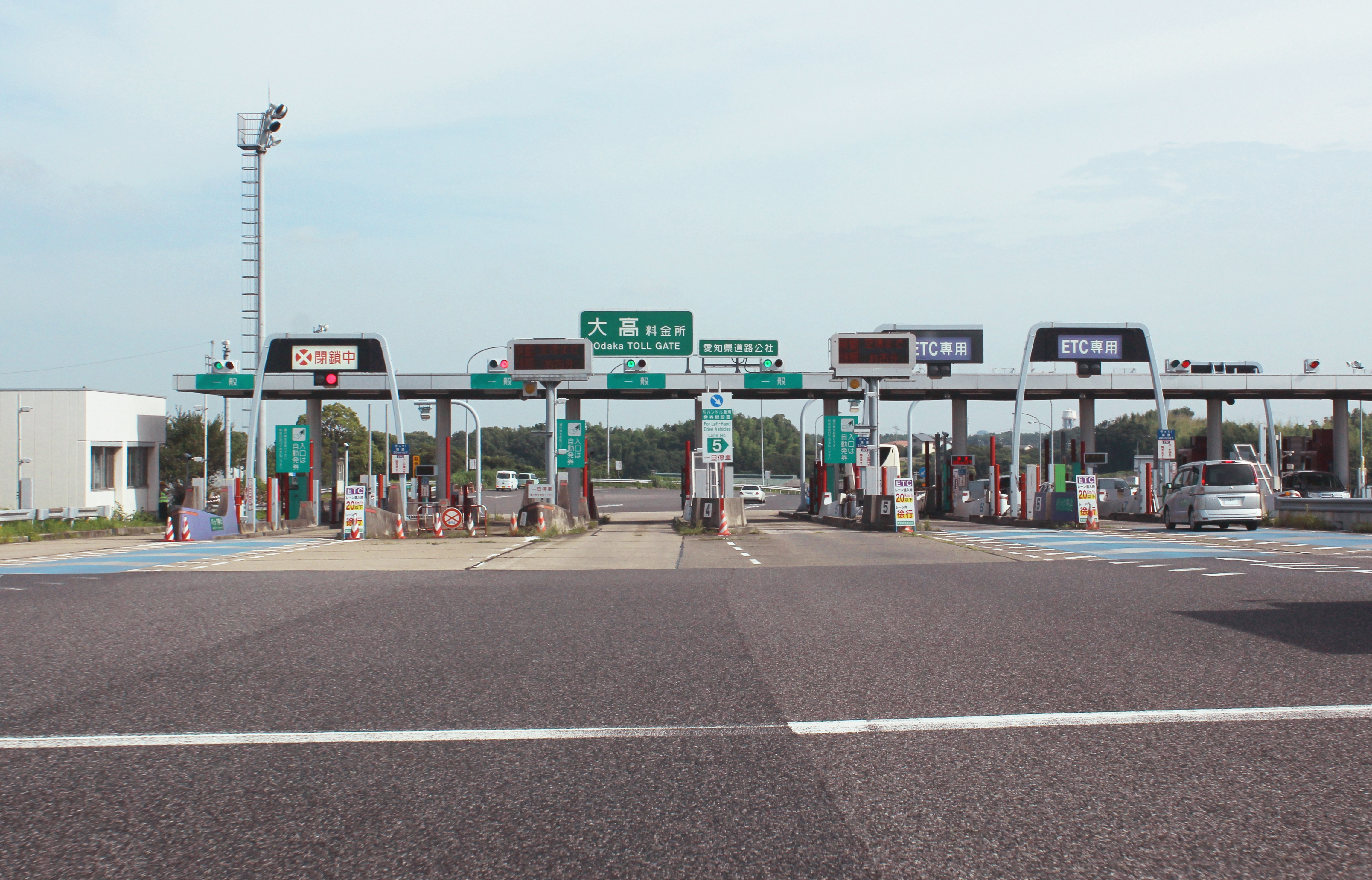 知多半島道路 大高料金所